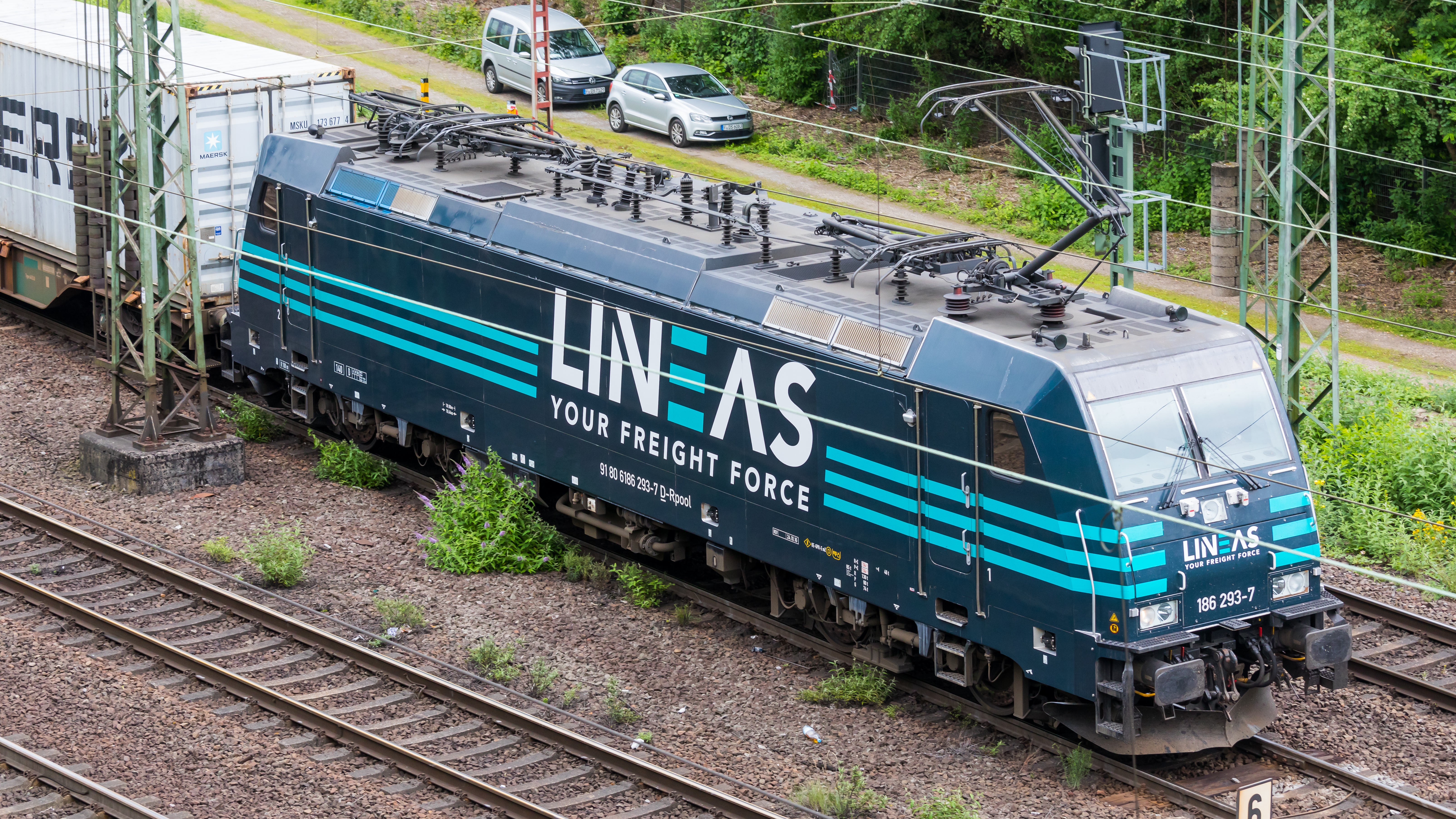 Güterzug mit Railpool-Lokomotive, Lineas-Lackierung, Köln, auf den Gleisen zwischen Herkulesberg und MediaPark in Fahrtrichtung Köln-West